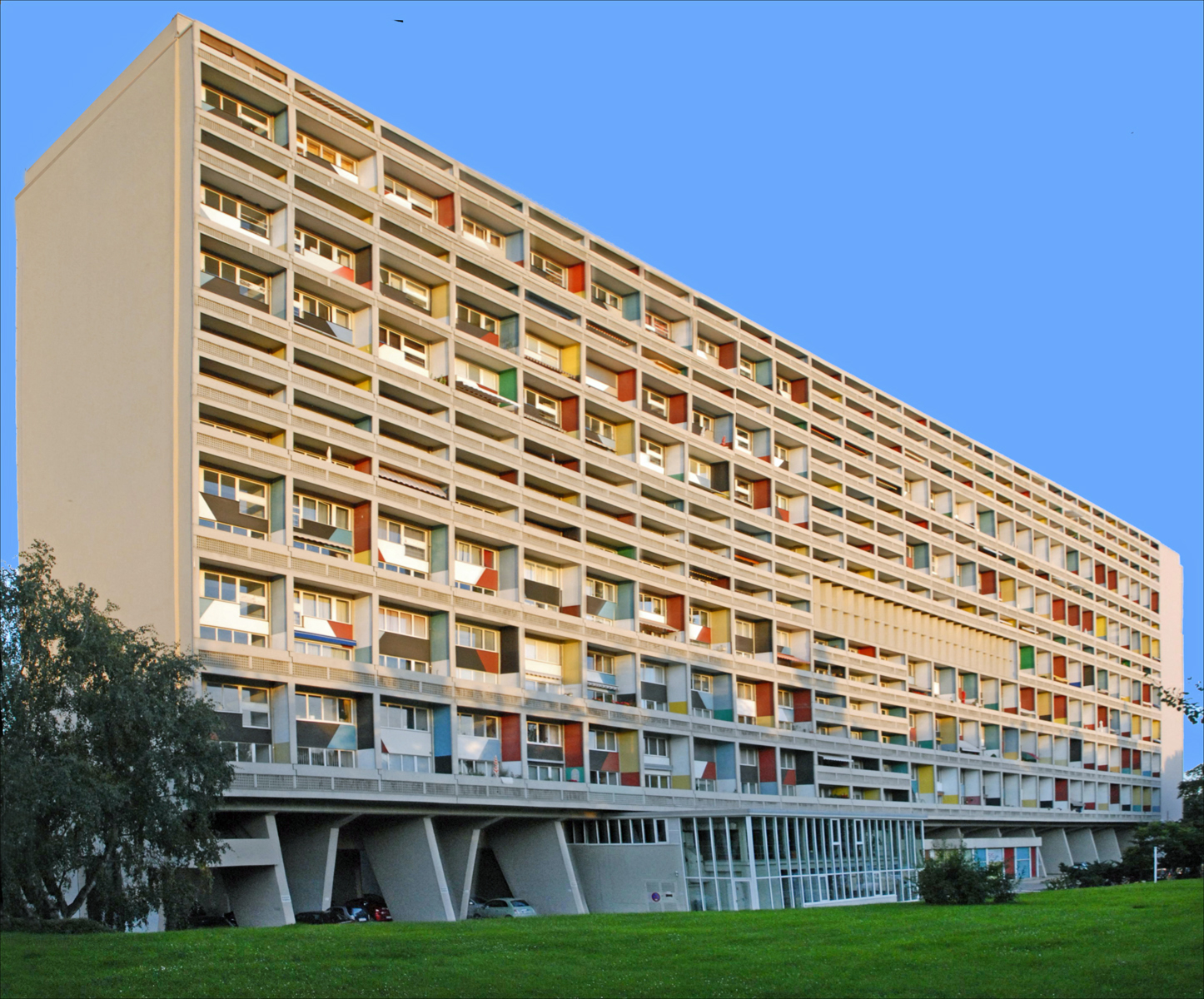 Vue d'ensemble de la Corbusierhaus L'unité d'habitation Corbusierhaus a été construite en 1957 sous la direction de l'architecte Le Corbusier (1887-1965). Sur le même modèle que la Cité Radieuse à Marseille, l'unité d'habitation de Berlin devait former un village autonome, pourvu d'une école, de services, de boutiques, etc. Le manque de crédits n'a pas permis de réaliser la totalité du programme. Le bâtiment, destiné à combattre la pénurie de logements après guerre à Berlin, compte 575 appartements répartis sur 17 étages. Il est à proximité du stade olympique. Fiche sur MIMOA